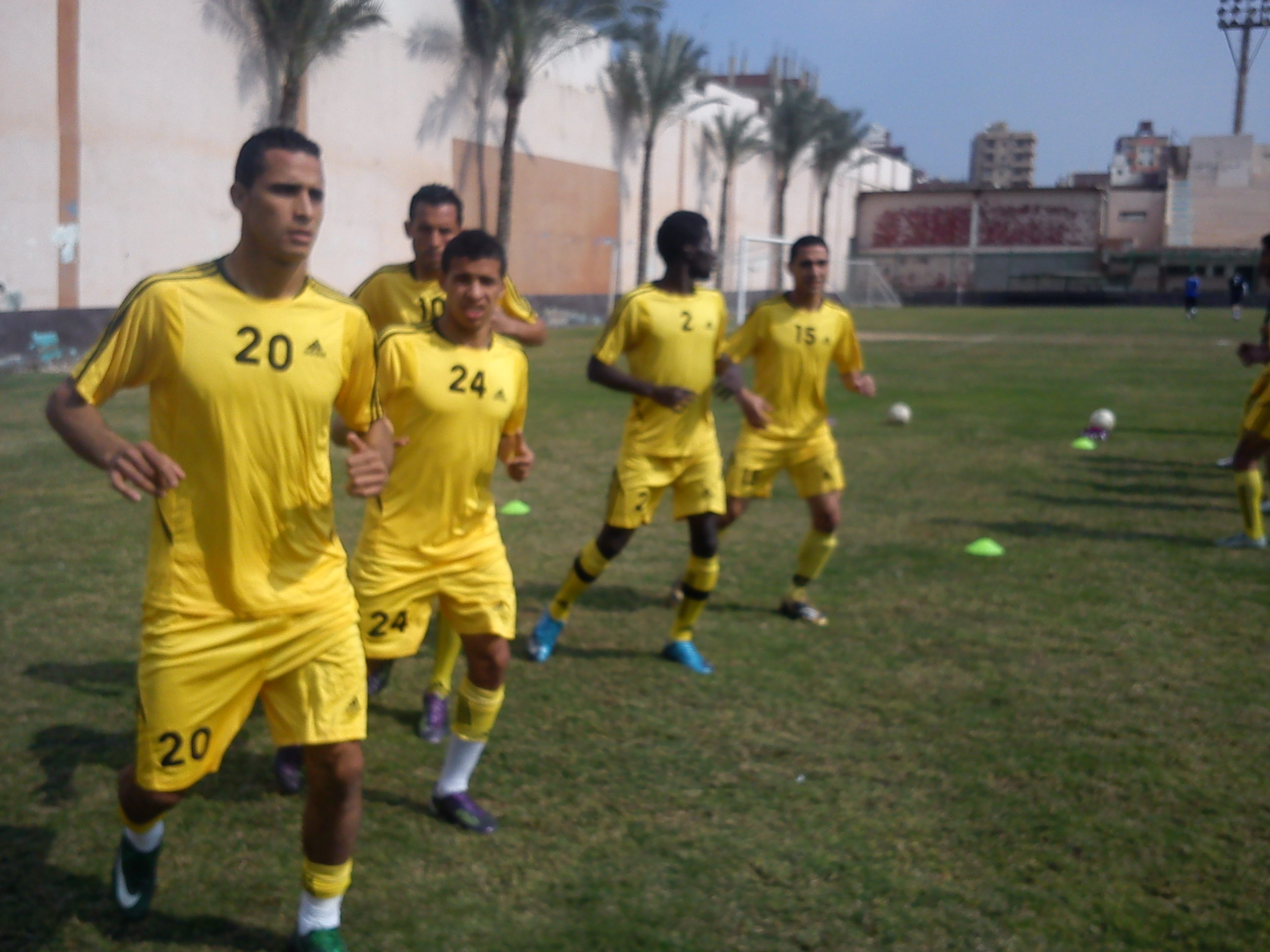 FC Belkas Stars .نجوم نادى بلقاس الرياضى